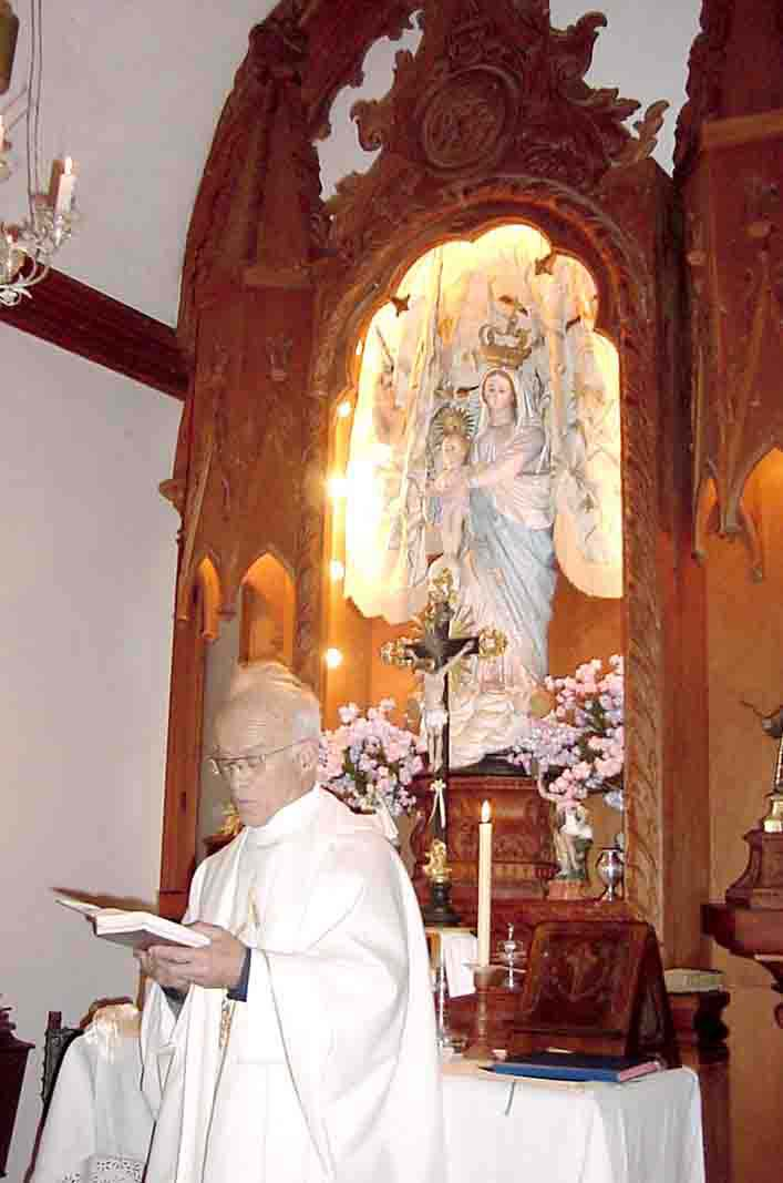 Villa Maria, Capela de Nossa Senhora das Vitórias, Angra do Heroísmo, ilha Terceira, Açores, Portugal.